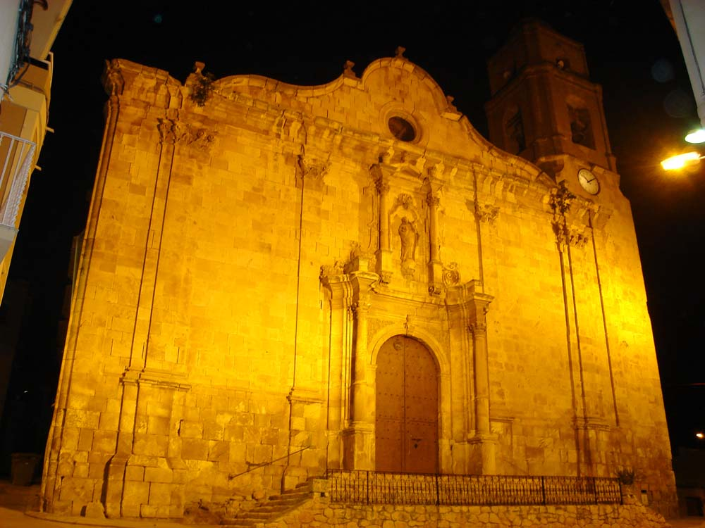 Iluminacion de la Fachada